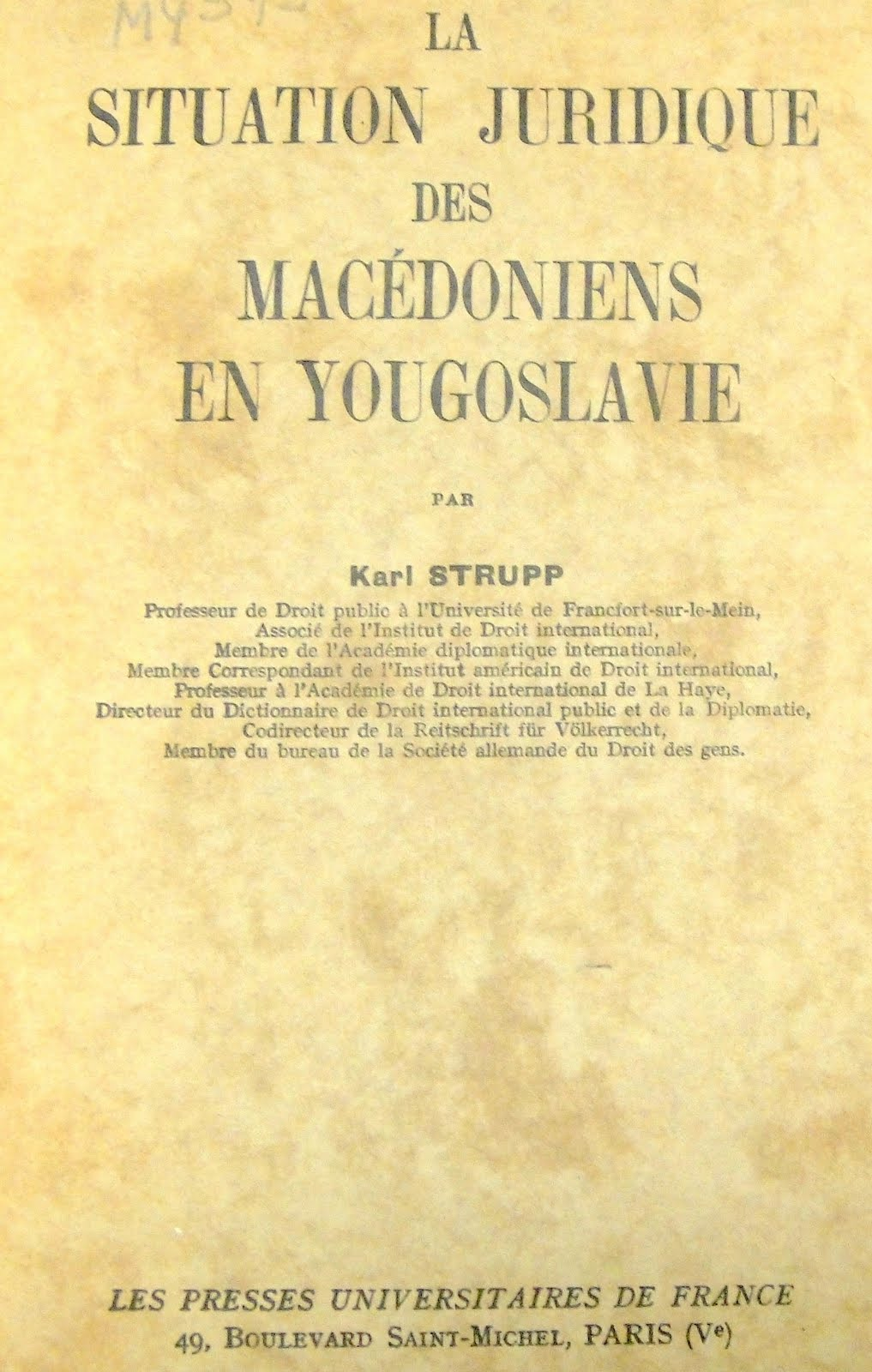 La Situation Juridique des Macedoniens en Yugoslavie на Карл Щруп